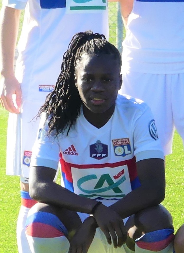 Griedge Mbock lors du match de l'Olympique lyonnais féminin contre Yzeure en Coupe de France le 28 janvier 2018.